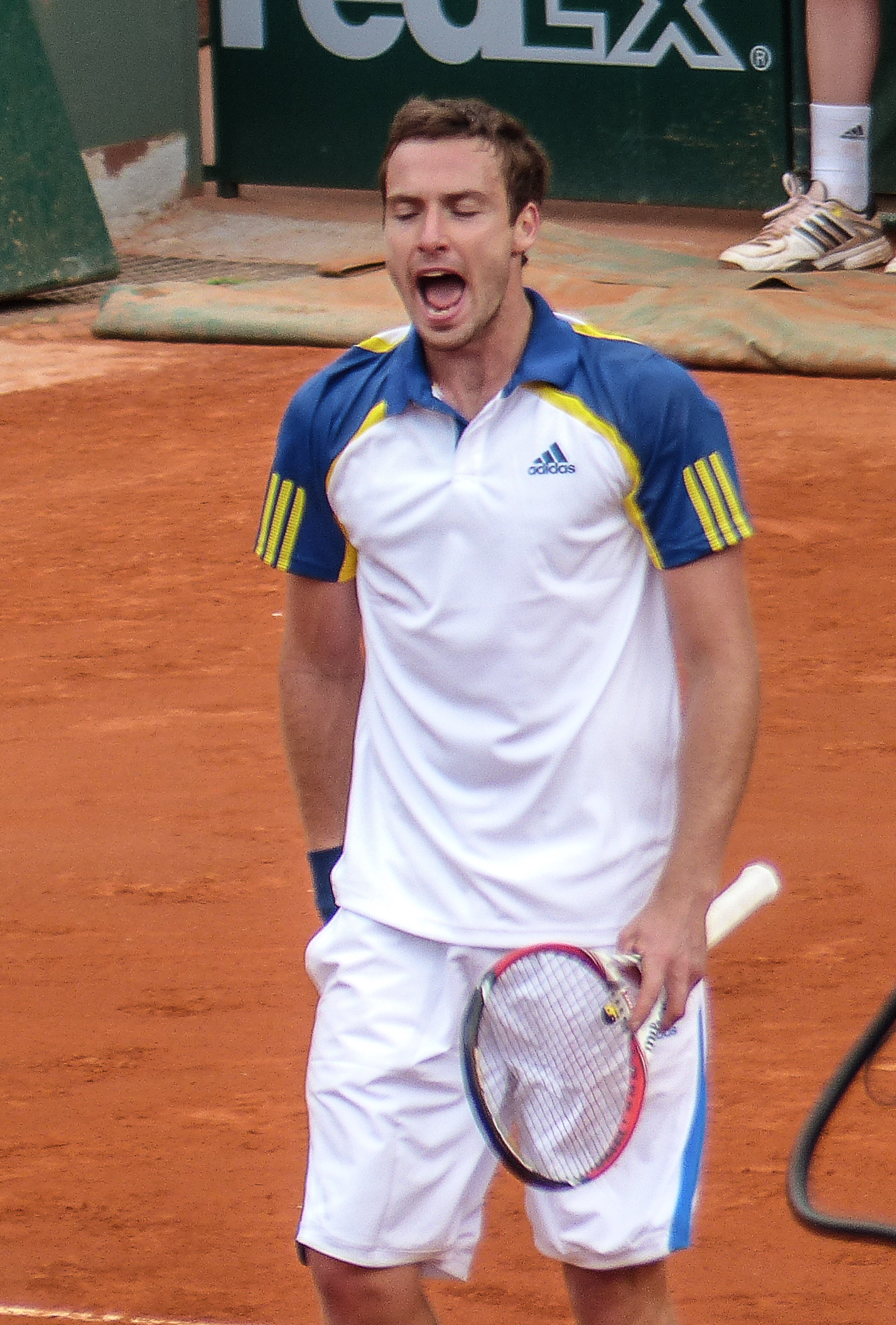 2ème tour Roland Garros 2013 : Gael Monfils (FRA) def. Ernests Gulbis (LAT)